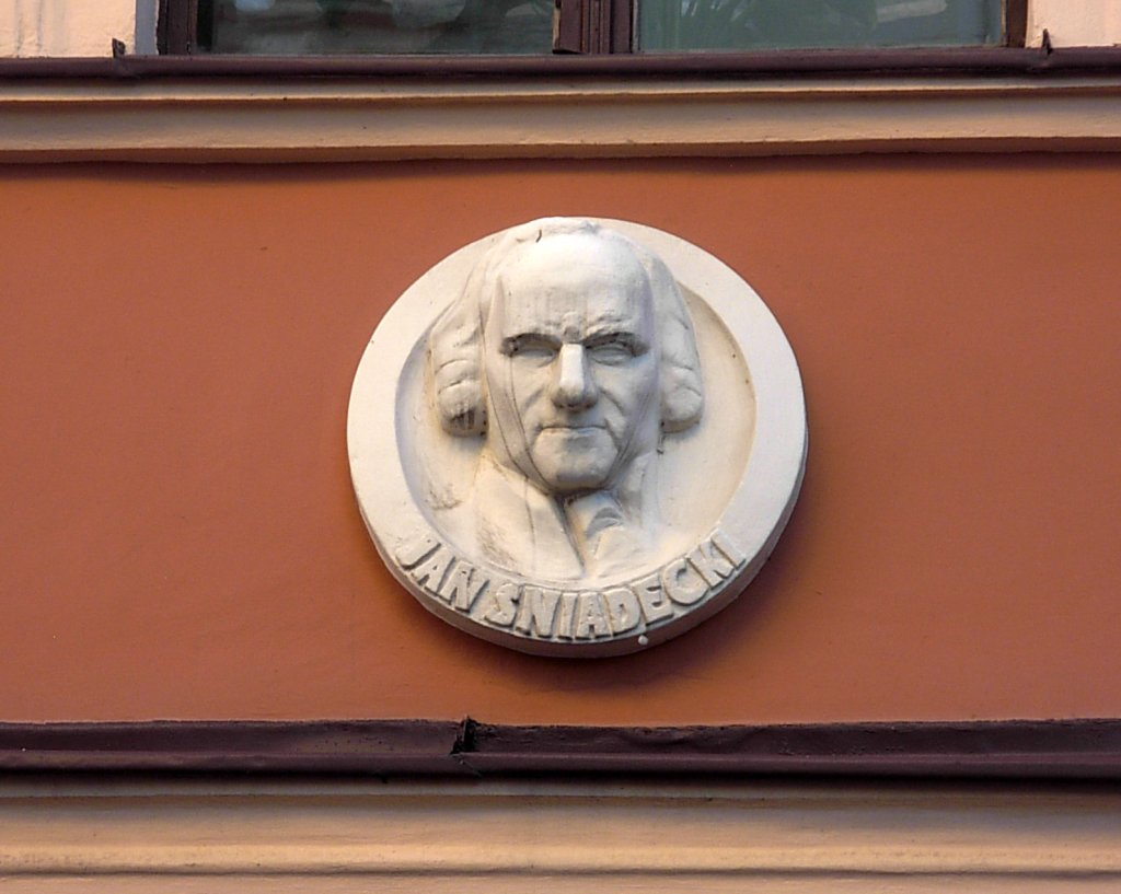 Jezuicka 2 Bydgoszcz - medalion Jan Śniadecki